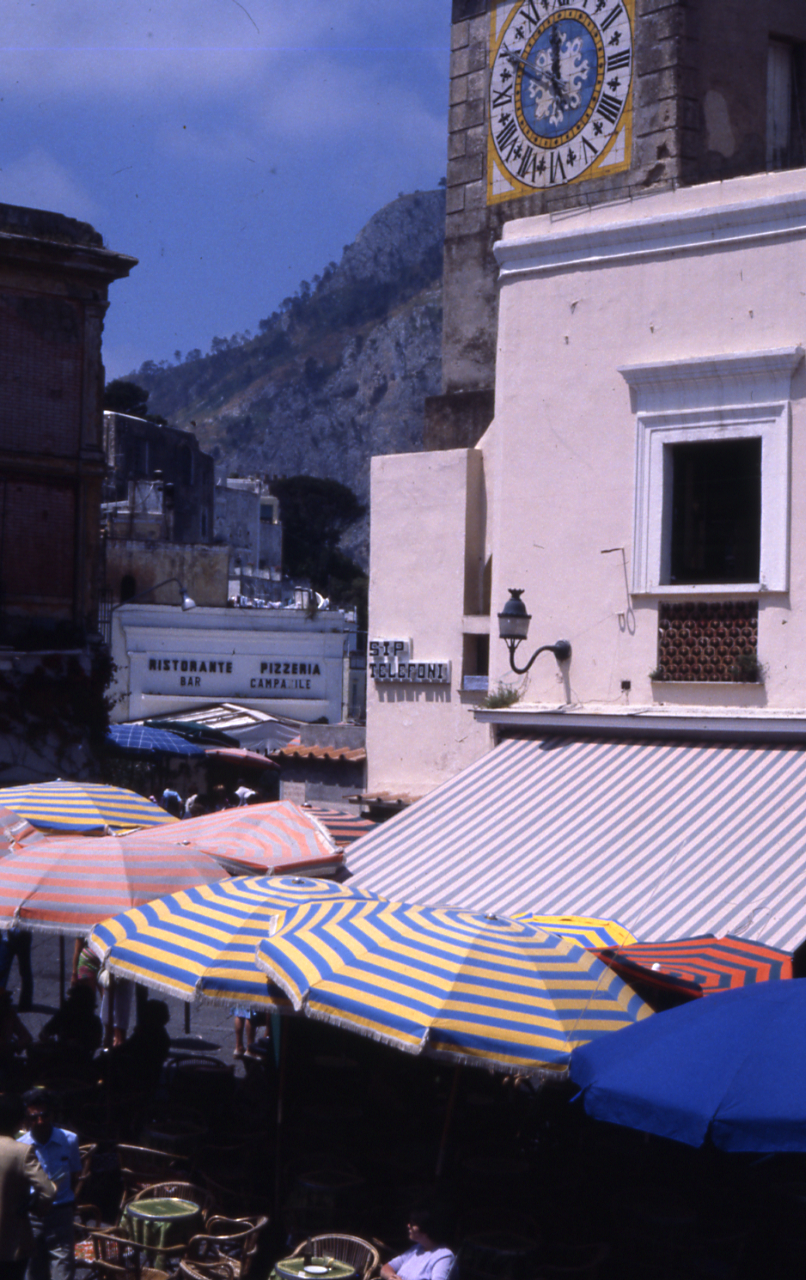 Sorrento. Isola di Capri. Piazze. Servizio fotografico : Capri, 1978 / Paolo Monti. - Foglio: 1, Fotogrammi complessivi: 1/20 : Diapositiva, sviluppo cromogeno/ pellicola ; 35 mm. - ((Le diapositive nn. 01-19 costituiscono altre serie. - Sullo chassis della diapositiva striscia adesiva in carta bianca con iscrizione inventariale? manoscritta: "MO 147". - Occasione: Reportage a colori sulle piazze italiane. - Fonte: Rubrica di Paolo Monti: Diapositive 24x36mm (1948-1982), presso Archivio Paolo Monti. Rubrica con elenco soggetti e numeri di inventario (da 1 a 1000) corrispondenti ai fogli a tasche in pvc in cui sono contenute le diapositive. - Fonte: Fattura di Paolo Monti: IV. Commesse/ Fattura n. 11/ Reportage fotografico diapositive a colori su piazze italiane (1978/06/30), presso Archivio Paolo Monti. Fotografie eseguite sulle seguenti piazze: Verona, Vicenza, Padova, Palermo, Cefalù, Carpri, Napoli e Nardò. Materiali e sviluppi: N. 18 rulli colore 6x6, n. 17 rulli colore 35mm, n. 18 sviluppi 6x6; n. 17 sviluppi 35mm